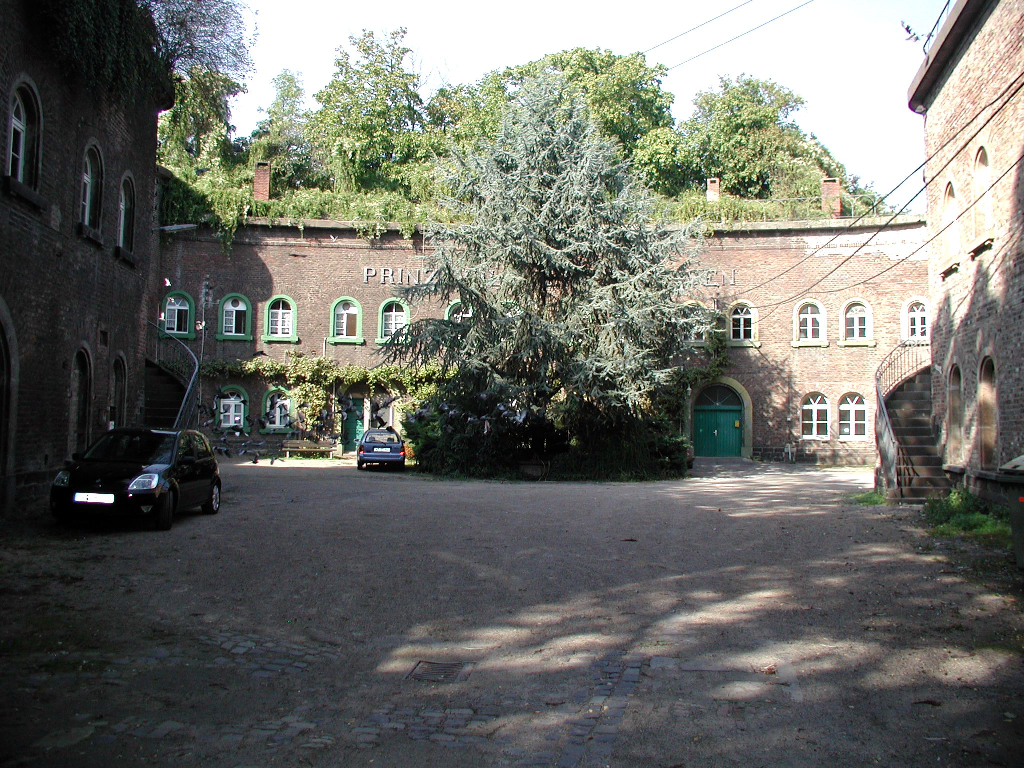 Coeln-Fort-X